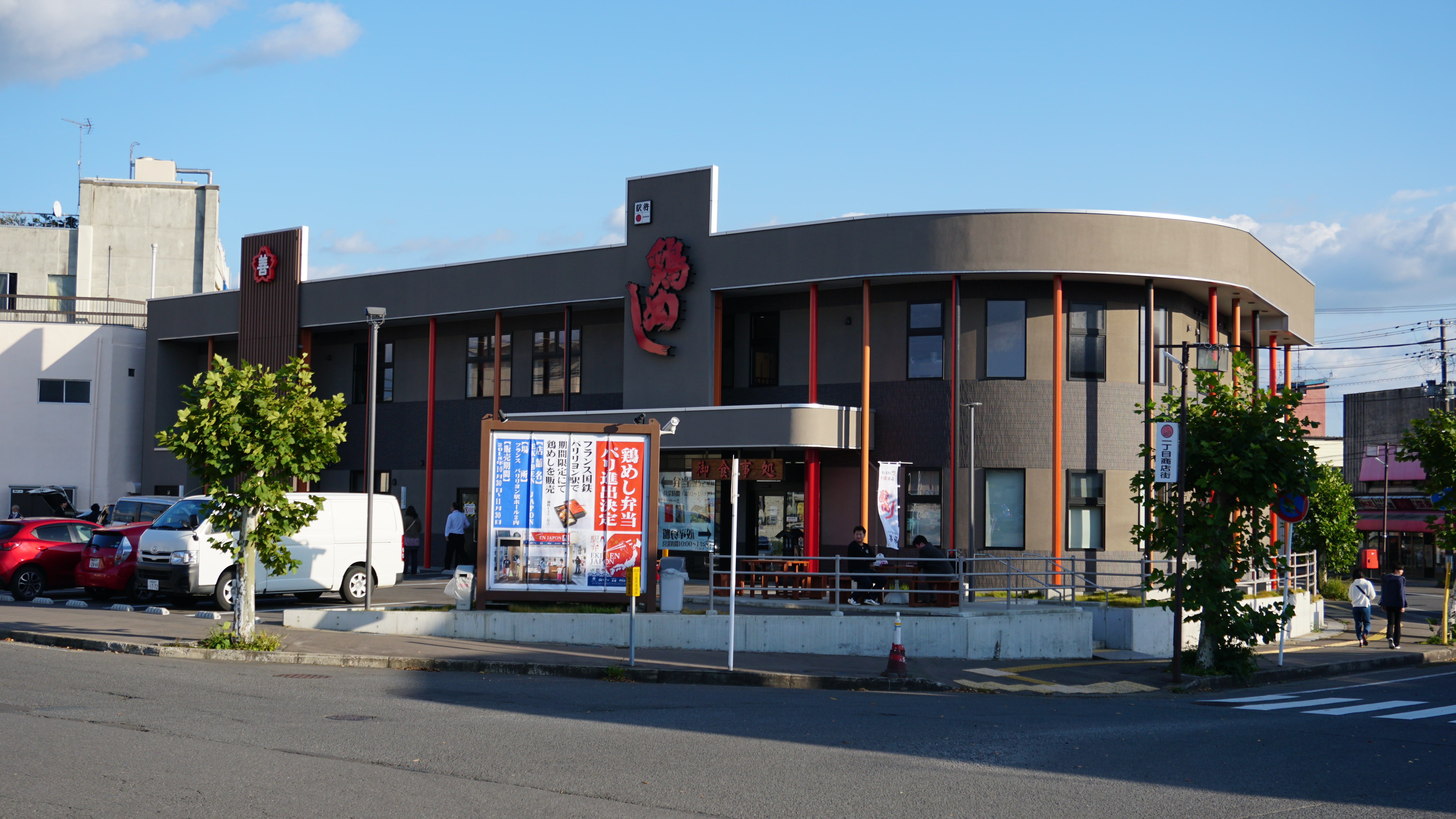 花善本社（秋田県大館市）。駅弁鶏めしの製造販売元である。